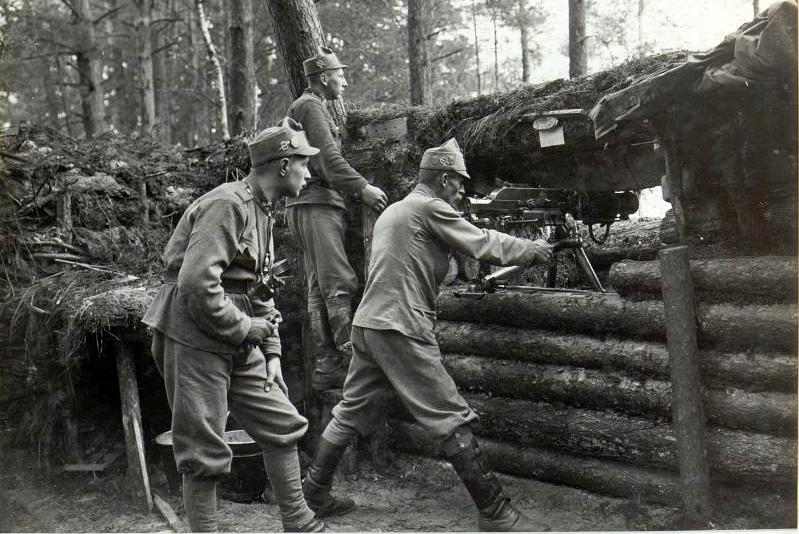 Maschinen Gewehr Abteilung 3.4 in der Waldstellung beim Infanterieregiment 4